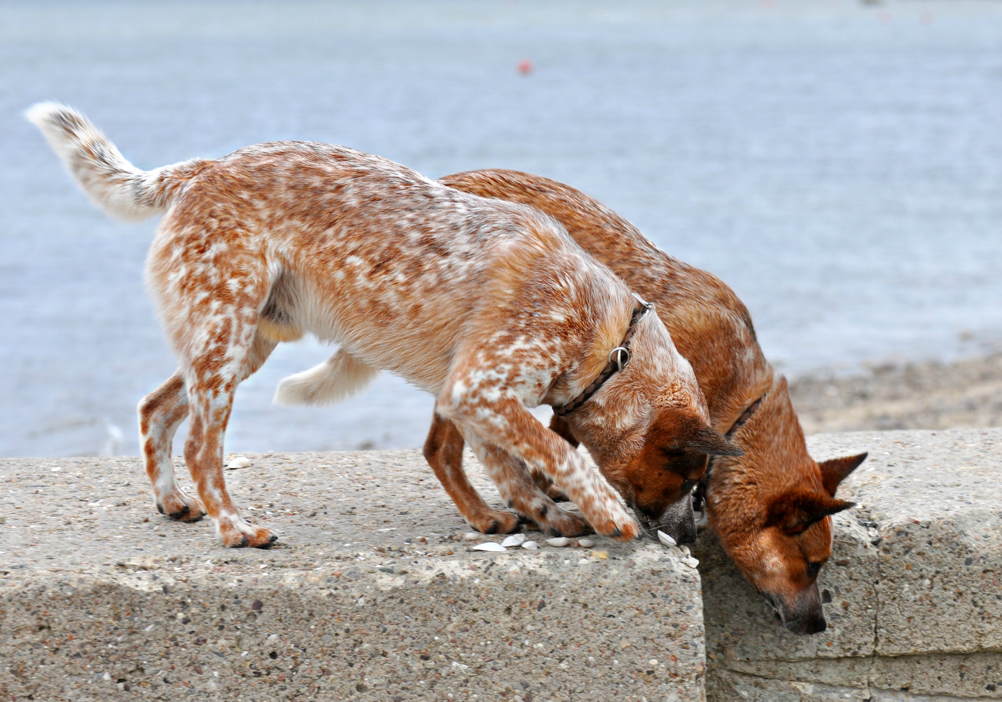 Junde rote Cattle Dogs mit verschieden stark ausgeprägtem Tüpfelungs-Gen (ticking-gen)